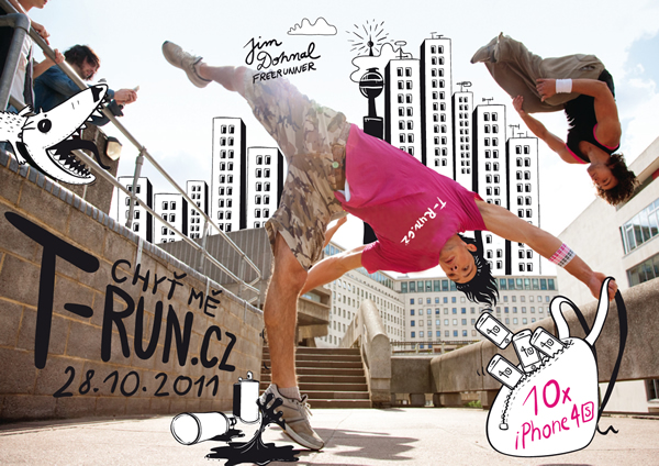 Plakát akce na podporu prodeje mobilu iPhone 4s